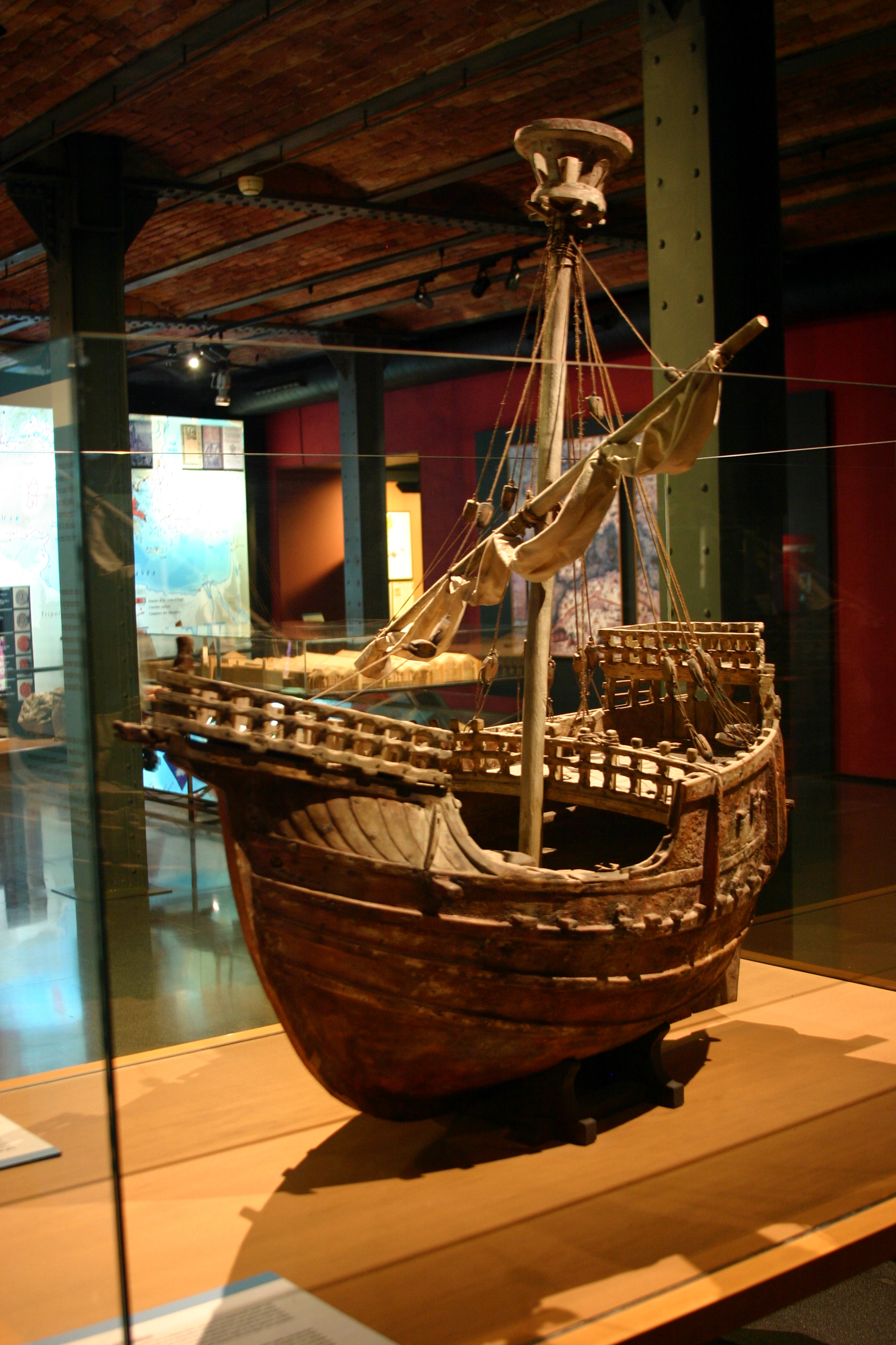 Museu da História da Catalunha